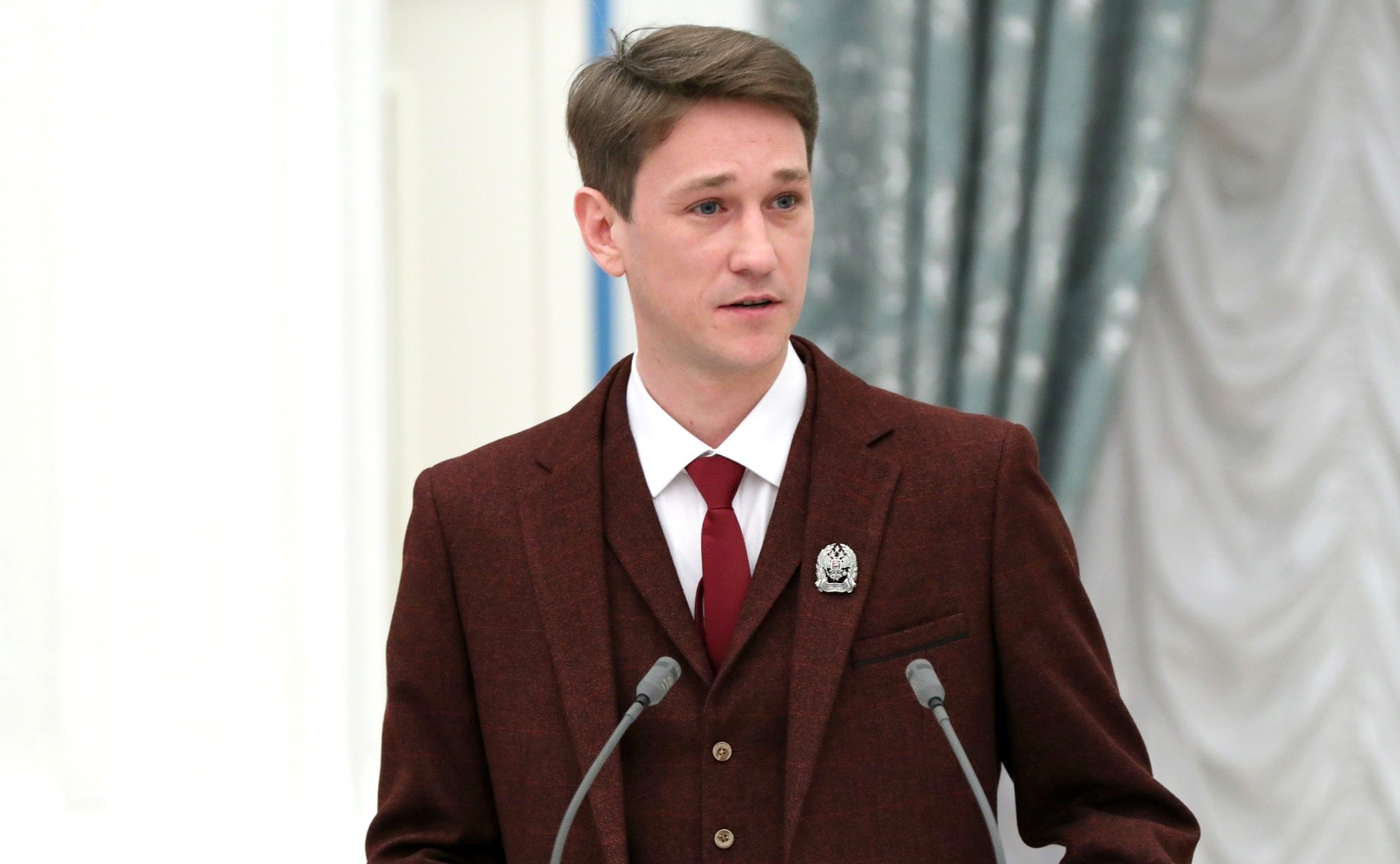 Лауреат премии Президента для молодых деятелей культуры 2016 года актёр Антон Шагин